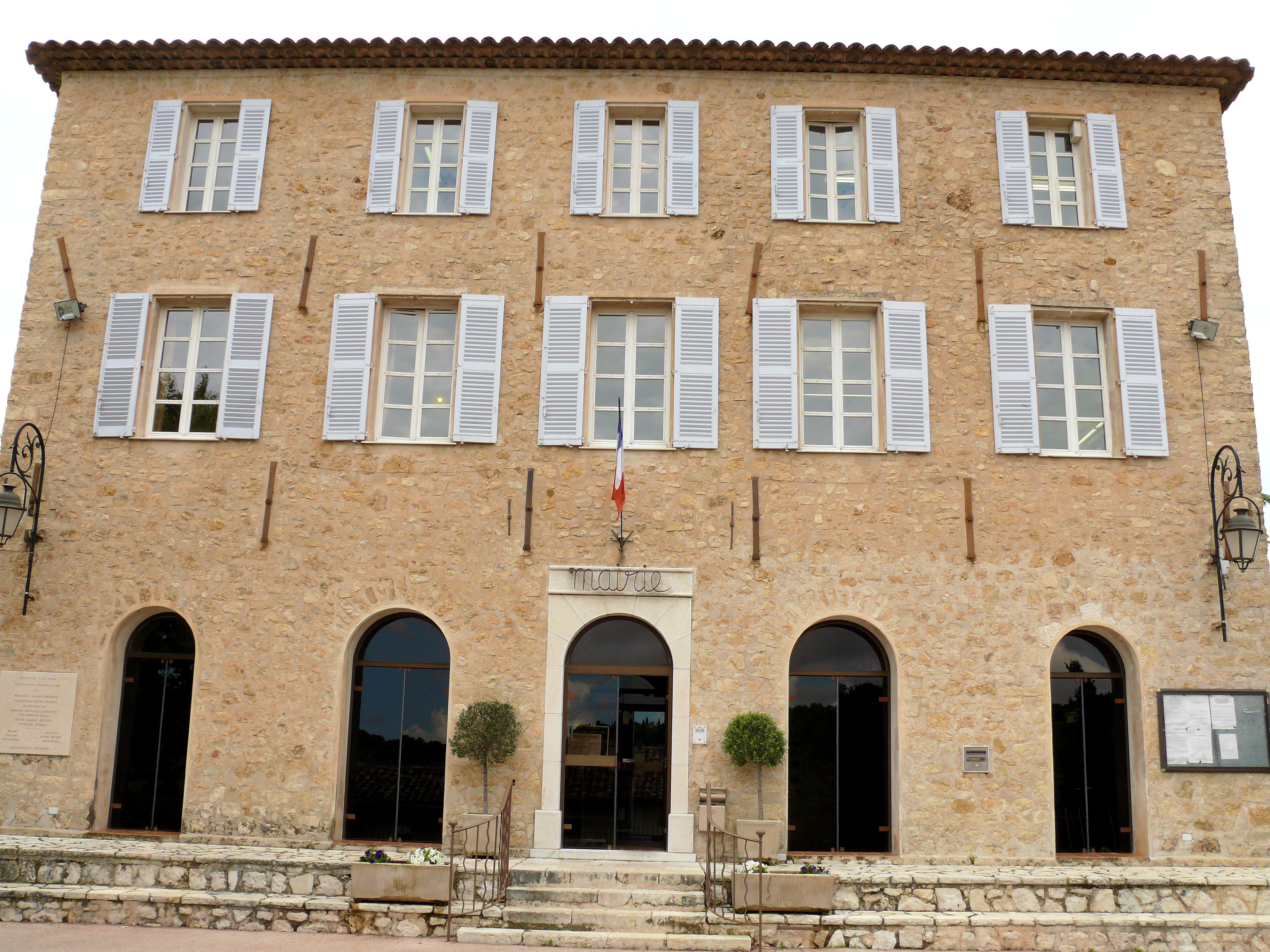 Opio - Mairie